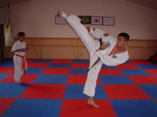 Esse chute é, na verdade, um lateral. Puxa-se o joelho em direção a cintura e estica-se a perna.